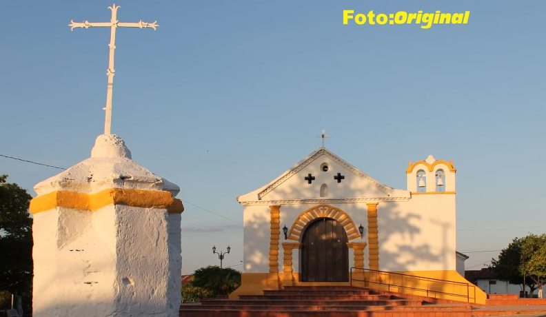 Capilla La virgen de la original por que fue donde aparecio la virgen de la original